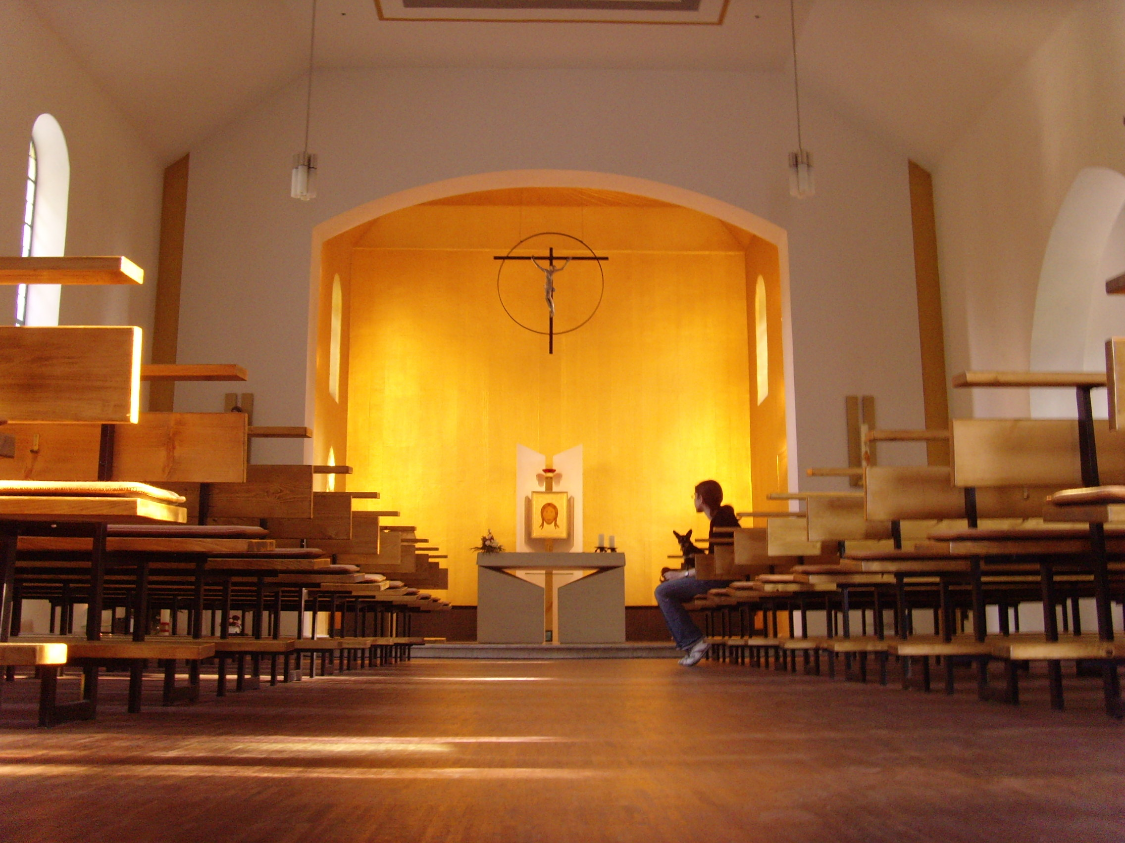 Innenraum der St.-Hubertus-Kirche nach der Umgestaltung durch die Architekten Harmel und Löser, Dresden, Weißer-Hirsch